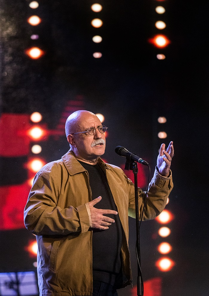 هوشنگ گلمکانی در اختتامیه سی‌وپنجمین جشنواره بین‌المللی فیلم‌کوتاه تهران